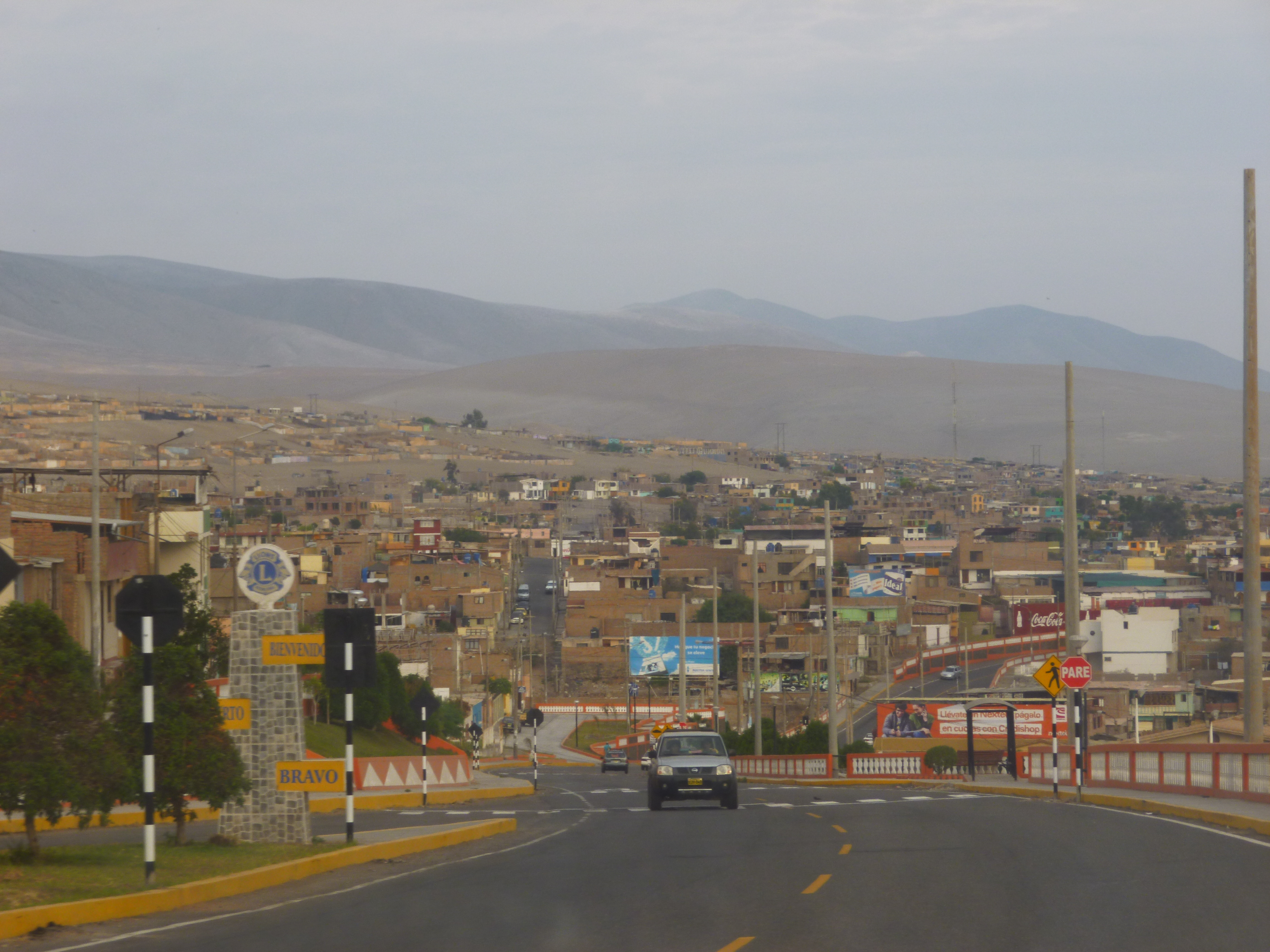 La Carretera Costanera a su paso por Mollendo.